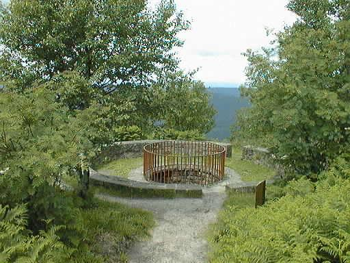 Puit à la base de la montée du Donon